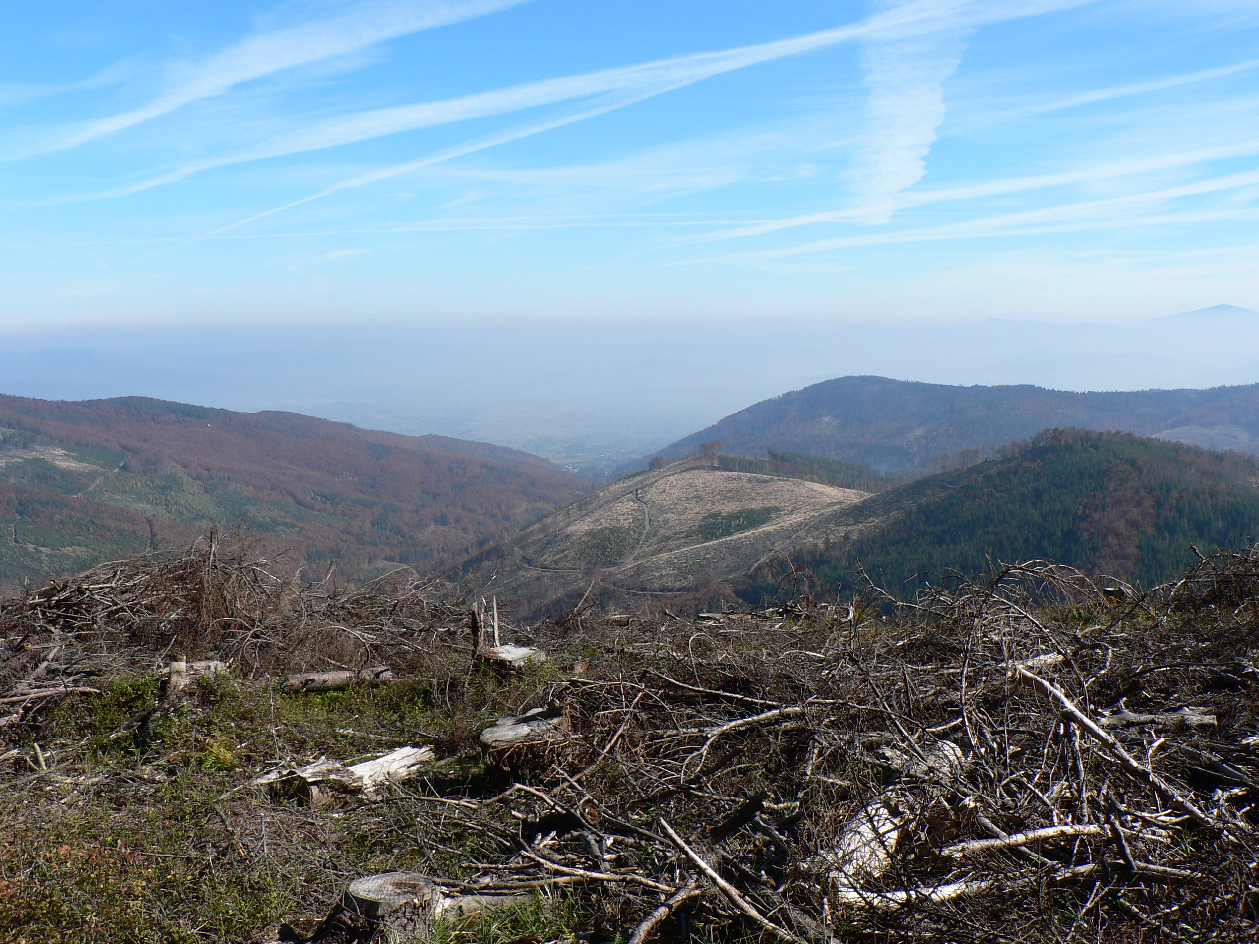 Kościelec i Ostre widziane ze szlaku ze Skrzycznego na Baranią Górę, gdzieś pomiędzy Malinowem a Malinowską Skałą